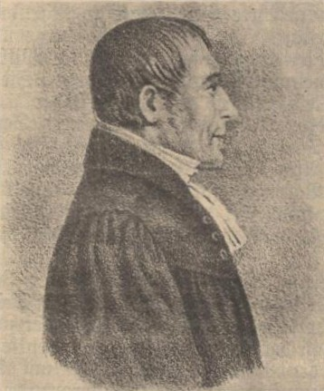 Beiträge zur Sächs. Volks- und Heimatkunde. Mit Zeichnungen von Professor O. Seyffert und Maler F. Rowland.